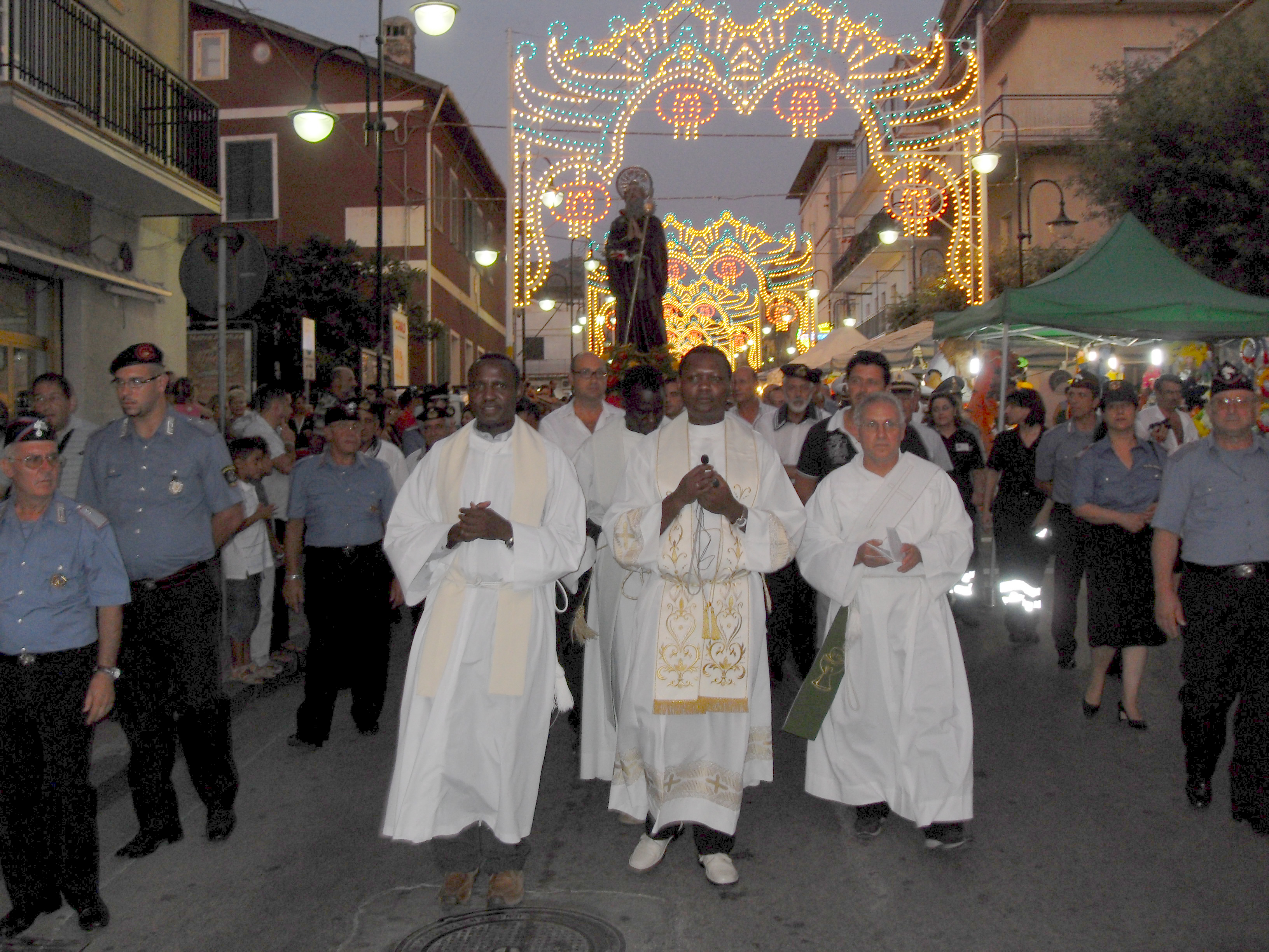 Io sottoscritto Luigi Salvatore Vadacchino, utente di Wikipedia sotto il nome di Lodewijk Vadacchino, cedo l'immagine SDC11325.jpg a Wikimedia Italia, sotto licenza CC-BY-SA, con il nome Campora_San_Giovanni_09-FestaSanFrancesco-Processione.jpg L'Immagine fotografica raffigurantela tradizionale processione della Festa di San Francesco di Paola del 3 settembre cadannuale. Porgo come sempre i miei distintissimi saluti, con l'augurio che possiate venirmi a far visita. Vostro come sempre--12:46, 5 set 2009 (CEST)